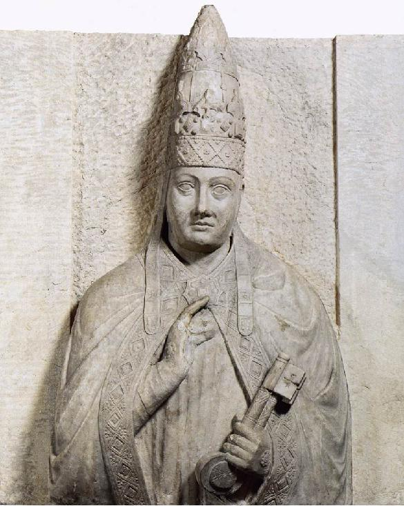 Monument Bonifaz VIII von Arnolfo di Cambio für das Grabmal von Bonifaz im Museo dell'Opera del Duomo in Florenz. Hier taucht die zweifache Tiara auf.